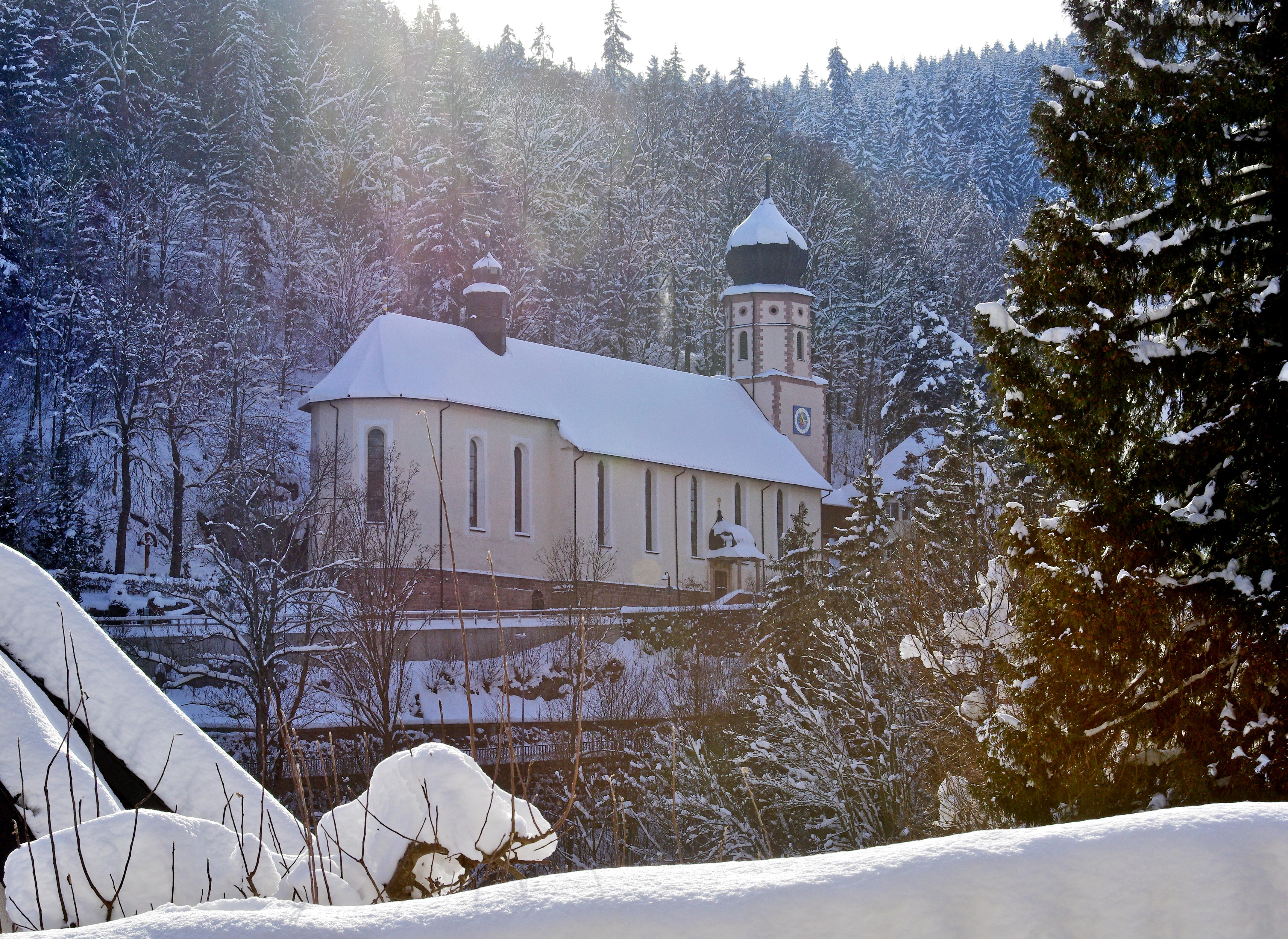 Bilder der Wallfahrtskirche "Maria in der Tanne" in Triberg Schwarzwald